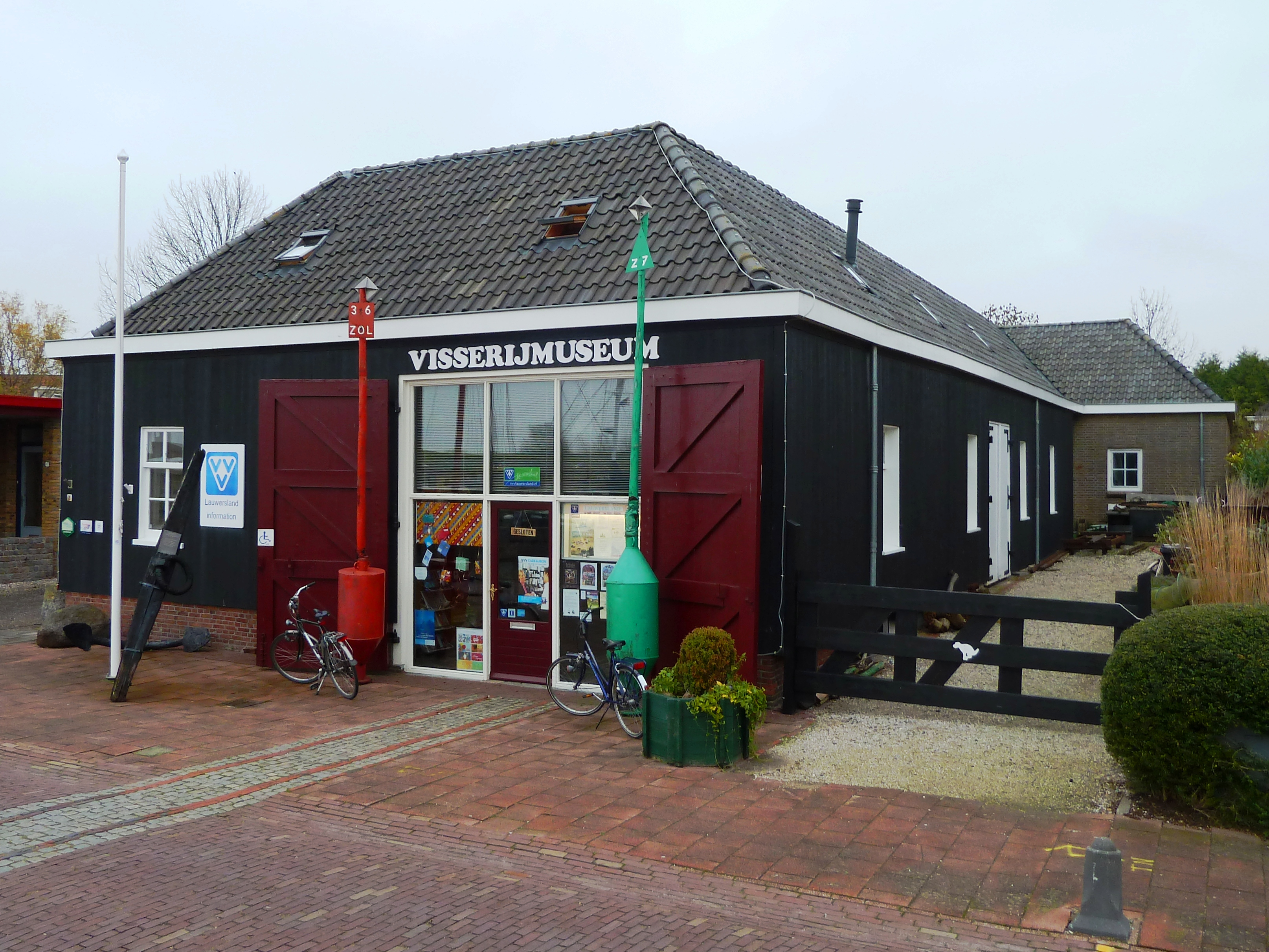 Voormalige loods van de betonningsdienst uit 1875 in Zoutkamp, sinds 1994 (na renovatie) in gebruik als het Visserijmuseum Zoutkamp.